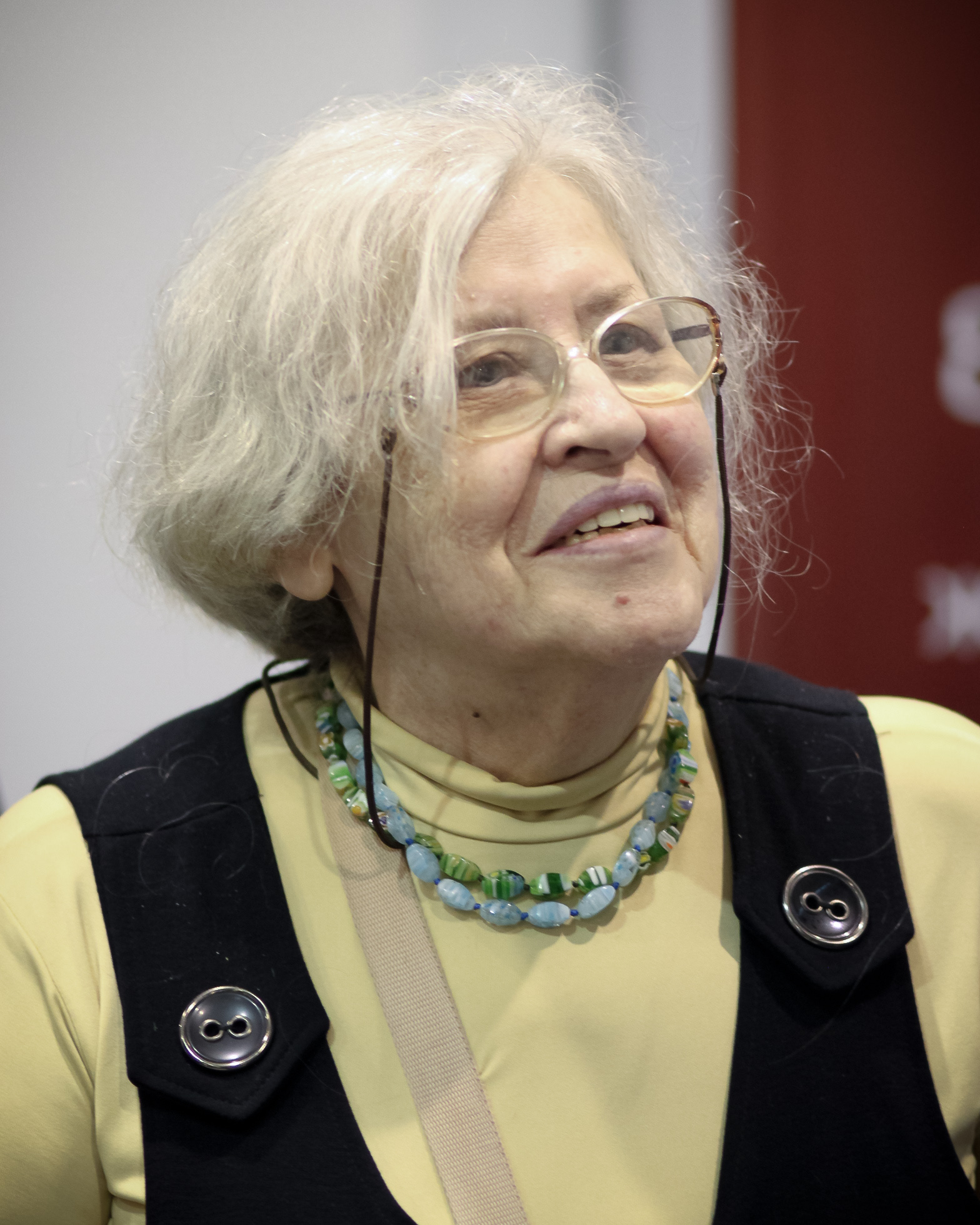 Марина Журинская напрезентации книги Вячеслава Бутусова "АрХиЯ" (ММКВЯ-2011)